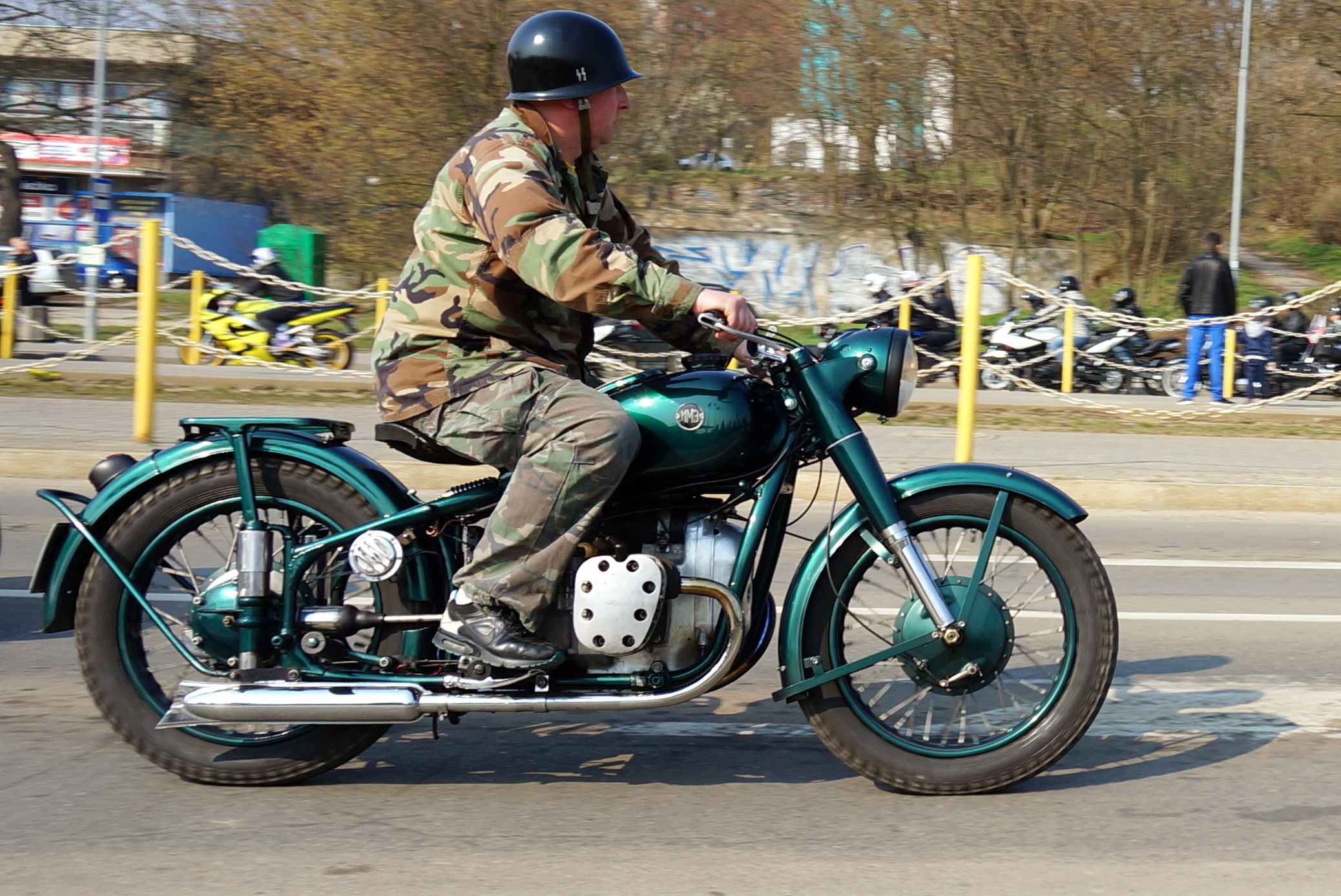 II Wojna Światowa. Zaskakująca ofensywa wojsk niemckich w 1941 r. i błyskawiczne zbliżanie się do Moskwy spowodowało ewakuację moskiewskich fabryk m.in. do Irbitu w obwodzie swierdłowskim. Tu powstała fabryka motocykli IMZ, które rok później trafiły do wojsk sowieckich. Na foto, unikatowy egzemplarz kolekcjonerski.